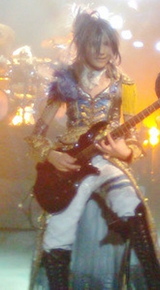 Teru, guitarrista de la banda Versailles.